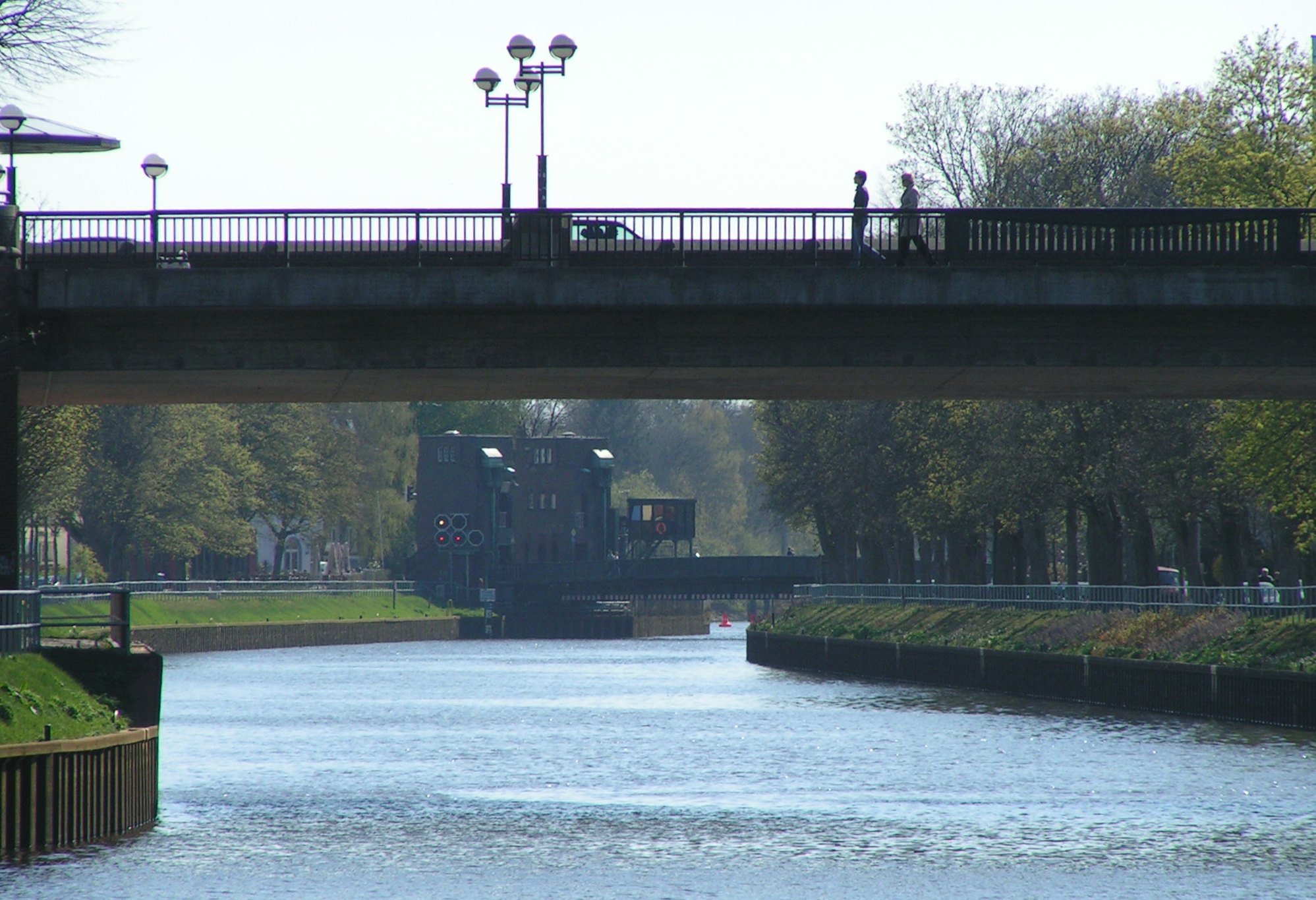 Einmündung des Küstenkanals in die Hunte in Oldenburg. Vorne die Amalienbrücke, hinten die Cäcilienbrücke.